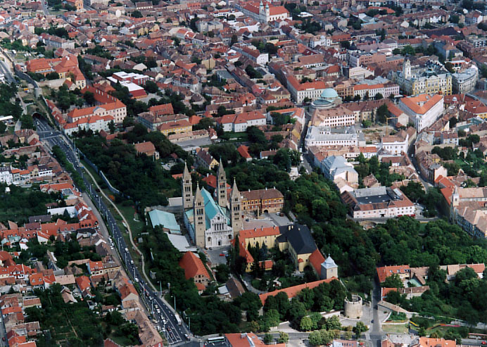 Pécs - Baranya megye - Hungary - Europe